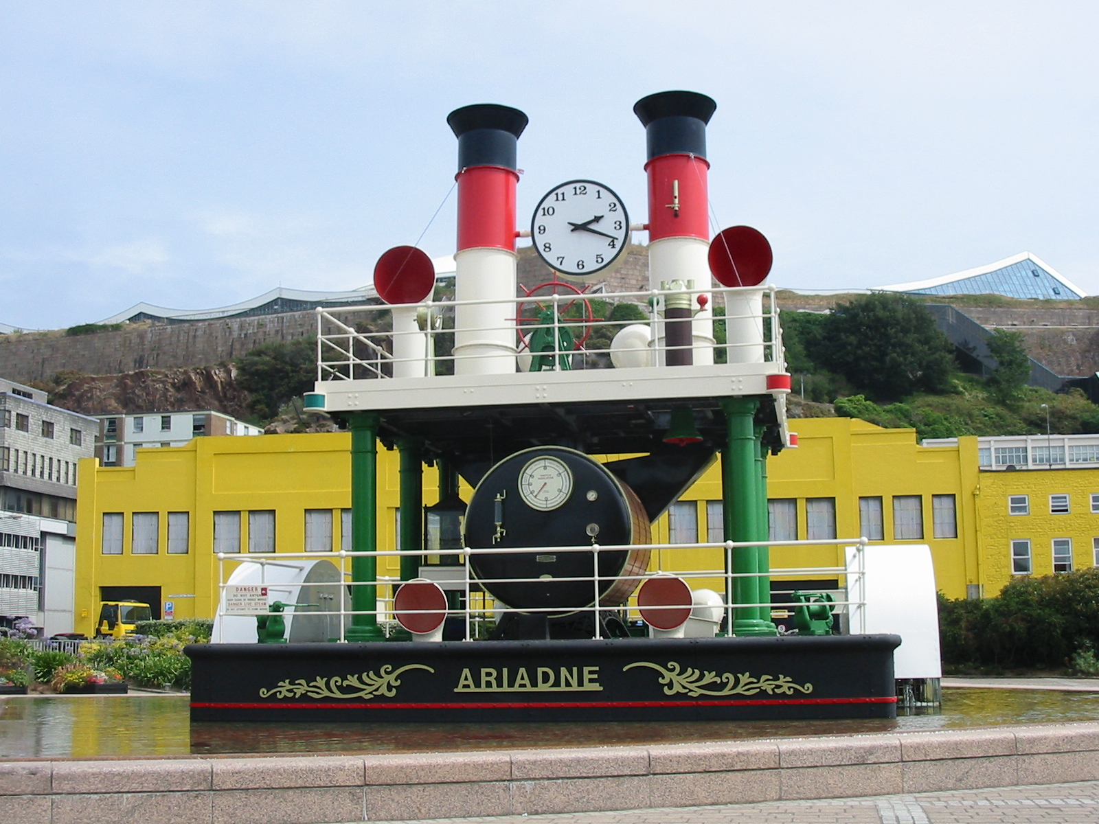 Ariadne Steam Clock St. Helier Jersey August 2006